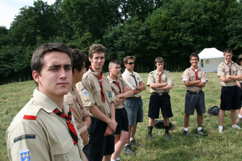 Pionniers, Village scout des Scouts et Guides Saint Benoît - Saint Maurice 2008